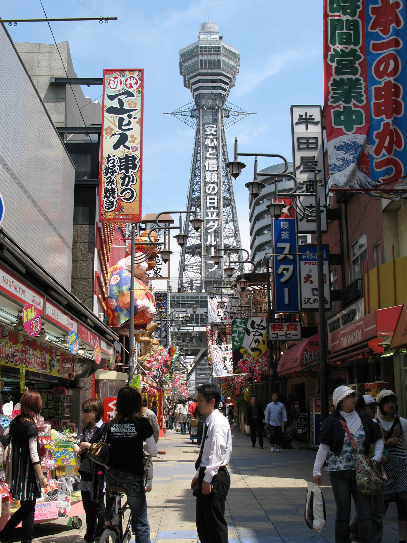 新世界と通天閣（南側から撮影） 2007年4月撮影。 機材：PowerShot G7 撮影者：Kansai explorer 撮影後レタッチ・リサイズ Category:塔の画像 Category:商店街画像